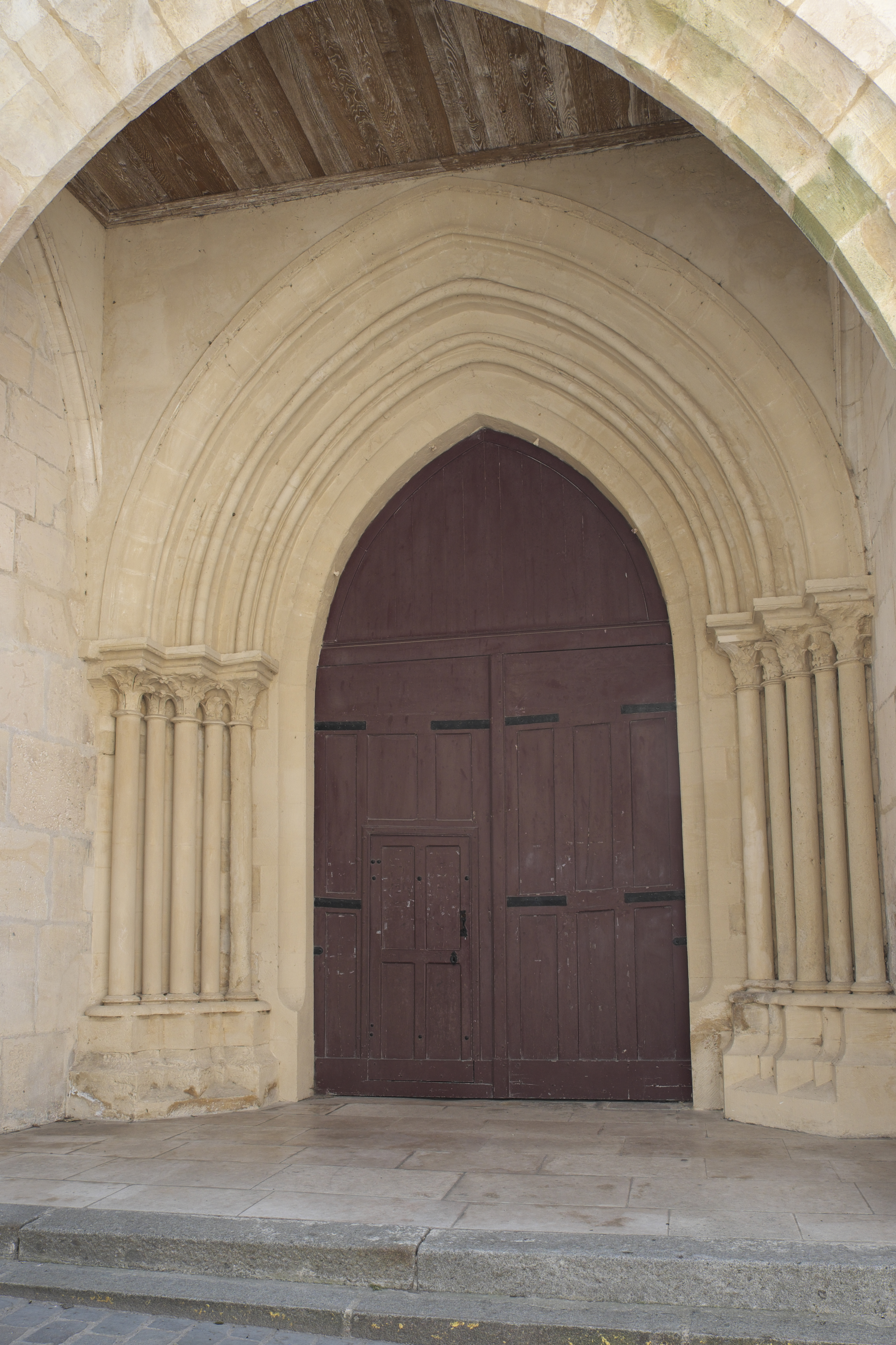 Katholische Kirche Saint-Germain in Andrésy im Département Yvelines (Île-de-France/Frankreich), Portal